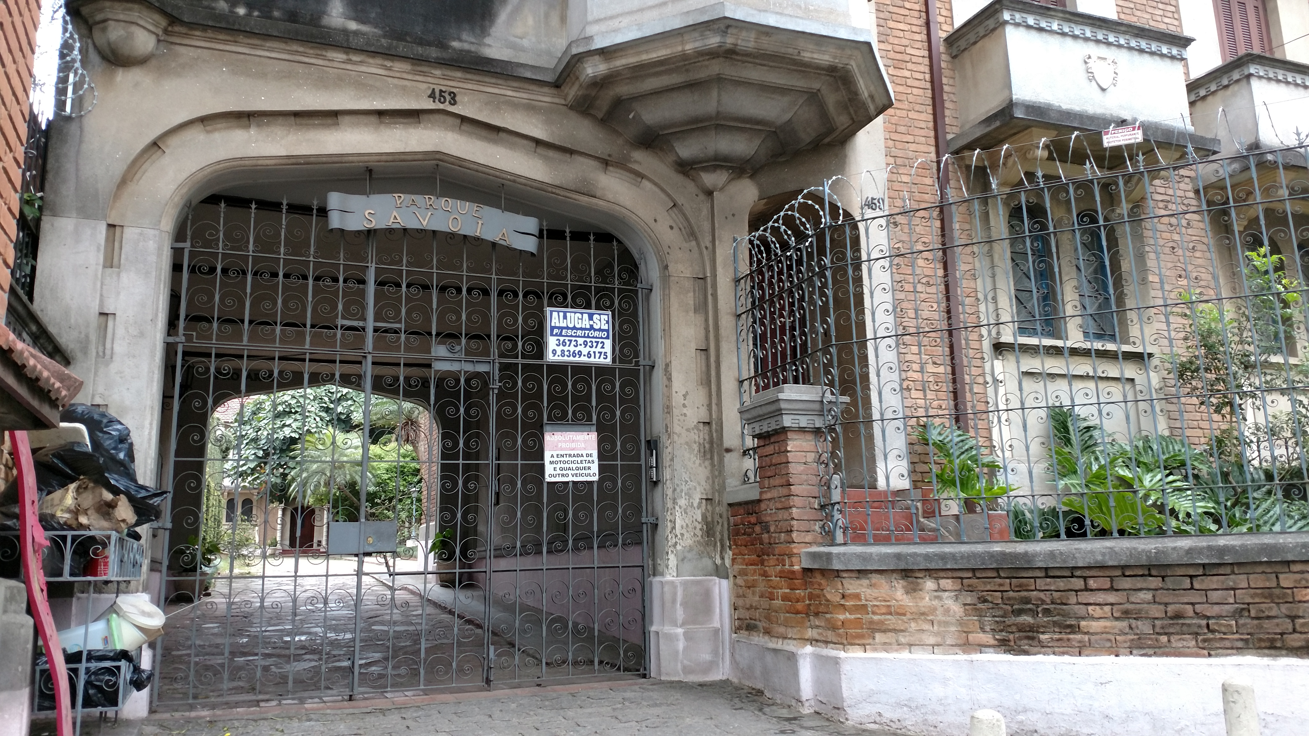 Entrada principal do Parque Residencial Savóia, com a placa "Parque Savoia", em São Paulo (SP)